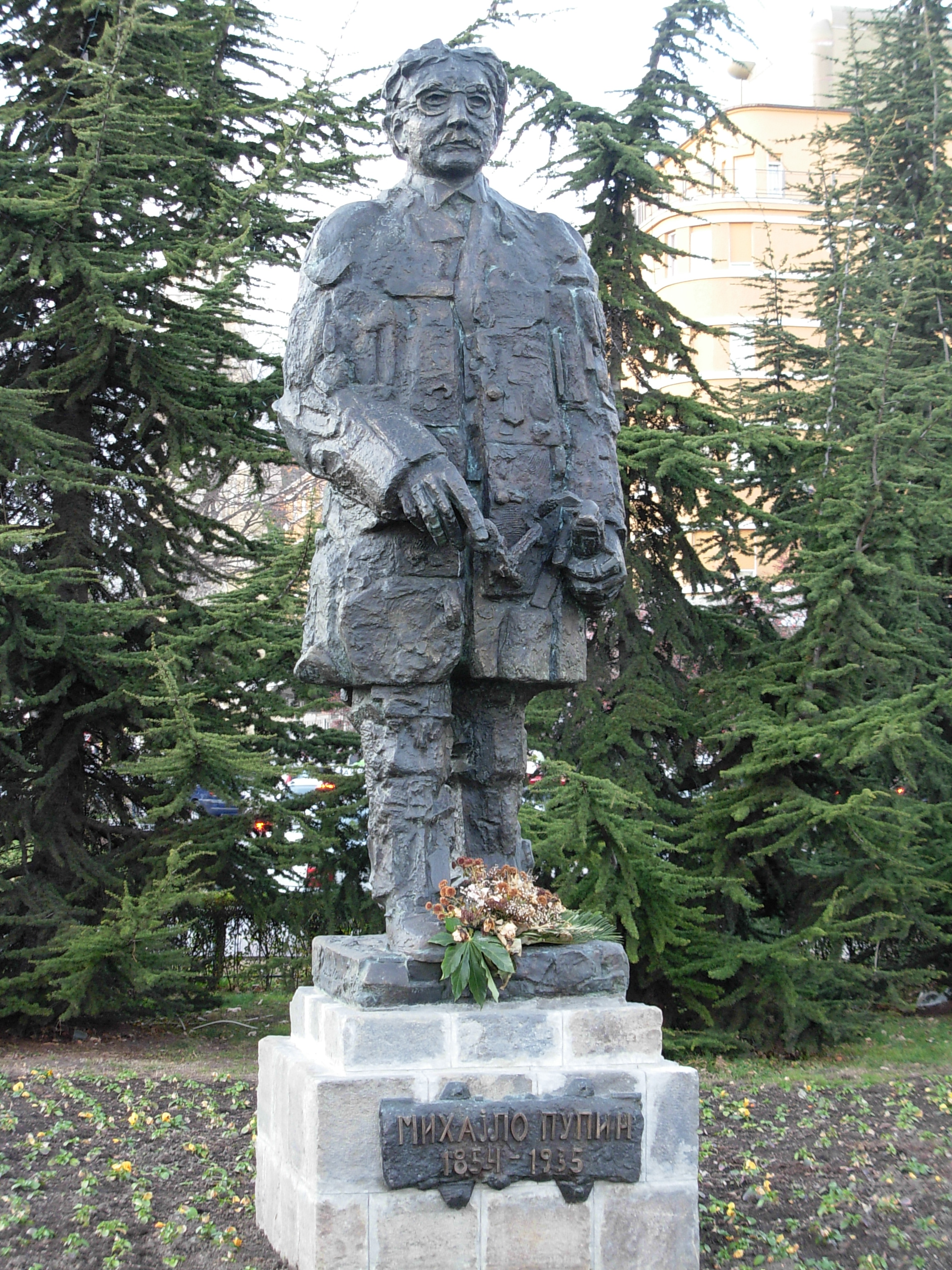 Statua Mihajla Pupina u Novom Sadu.